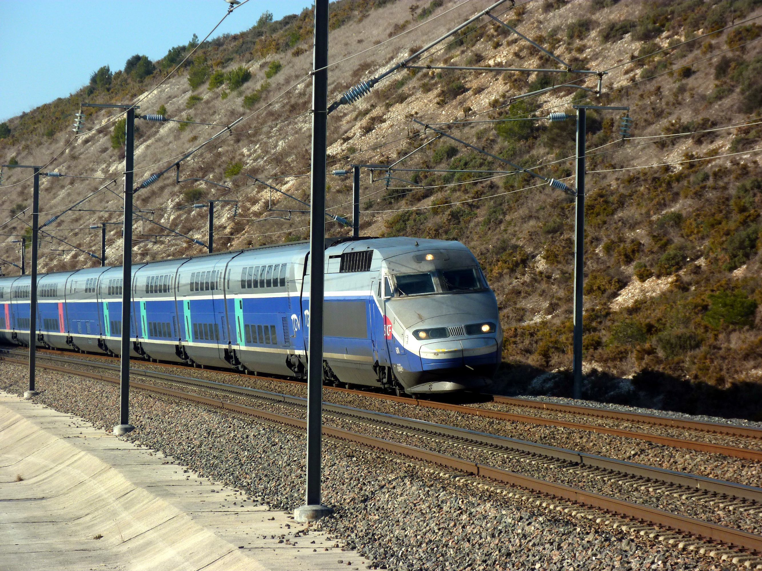 TGV Réseau Duplex n°618 circulant sur la LGV Sud-Est